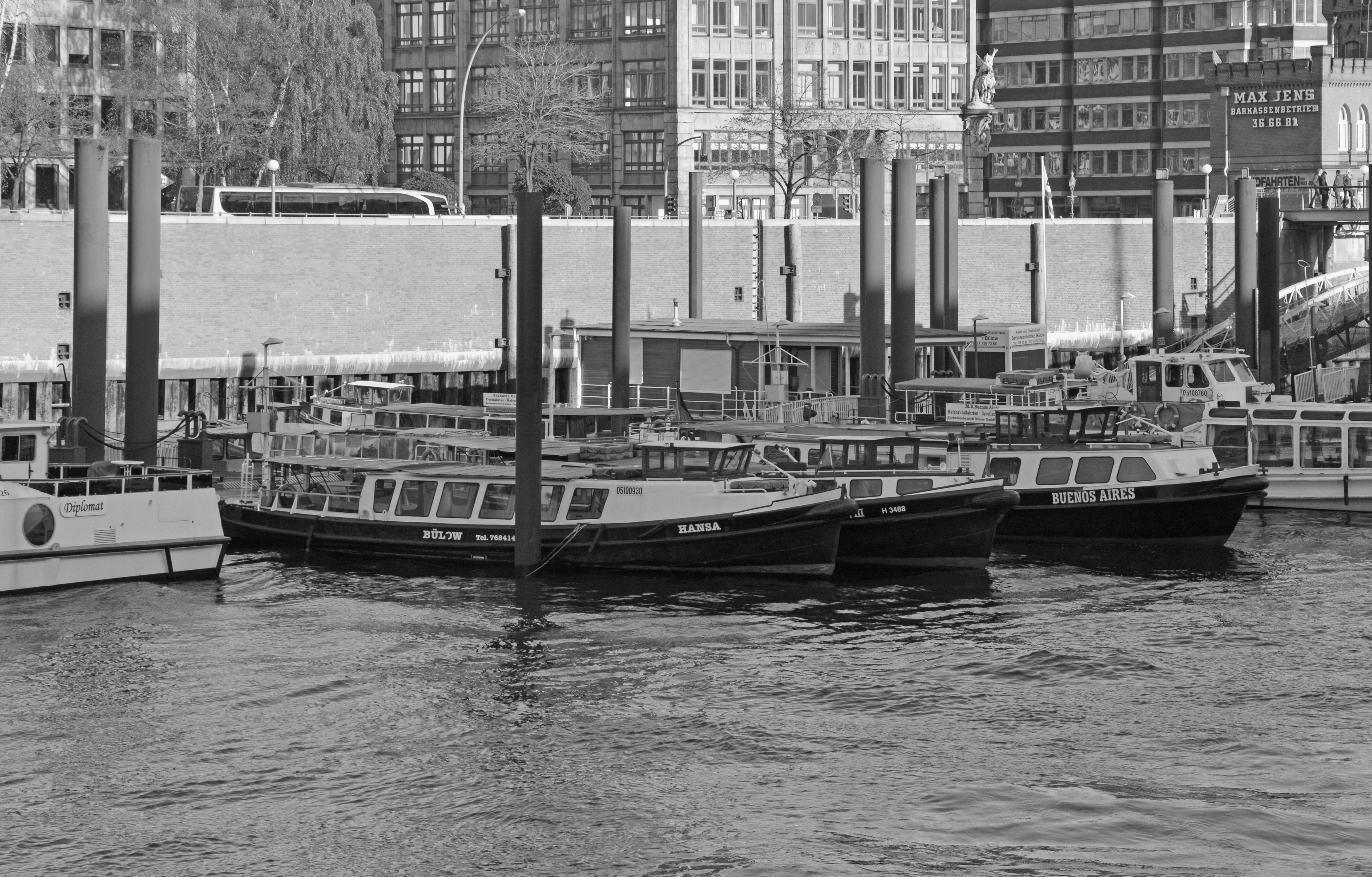 Hafenbarkassen im Hamburger Binnenhafen